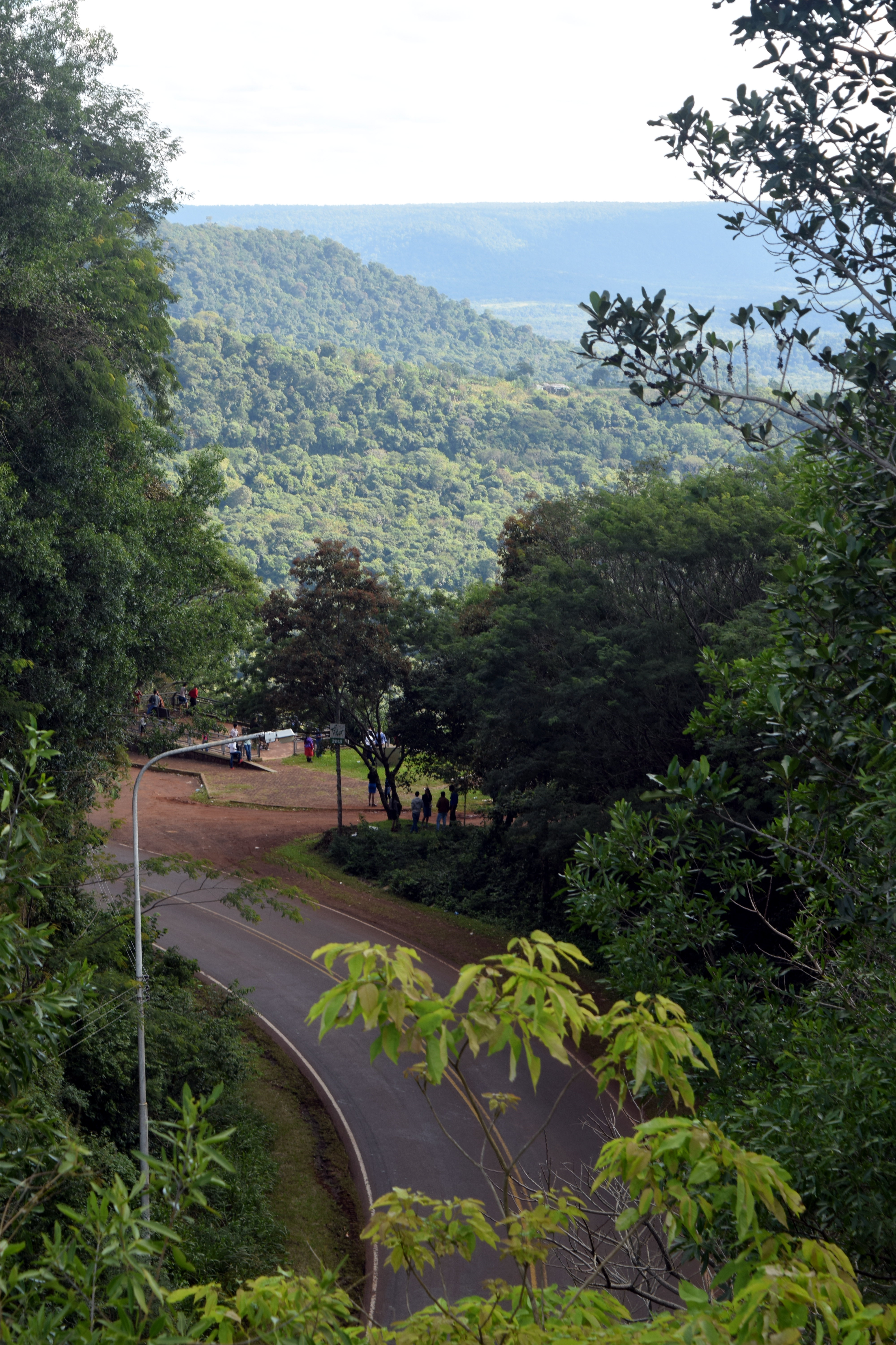 Ruta provincial 7 en Misiones, Argentina.